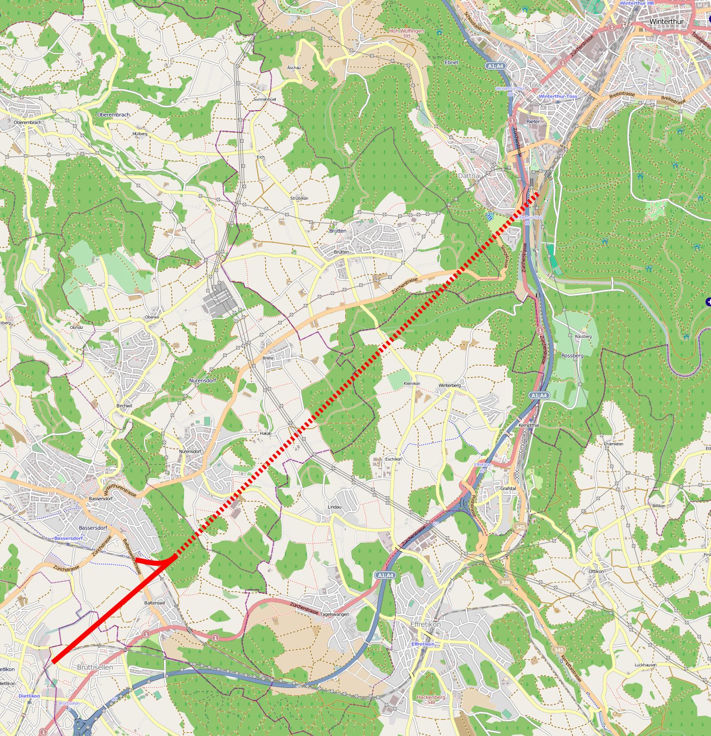 Die bevorzugte Variante des Brüttener Tunnels